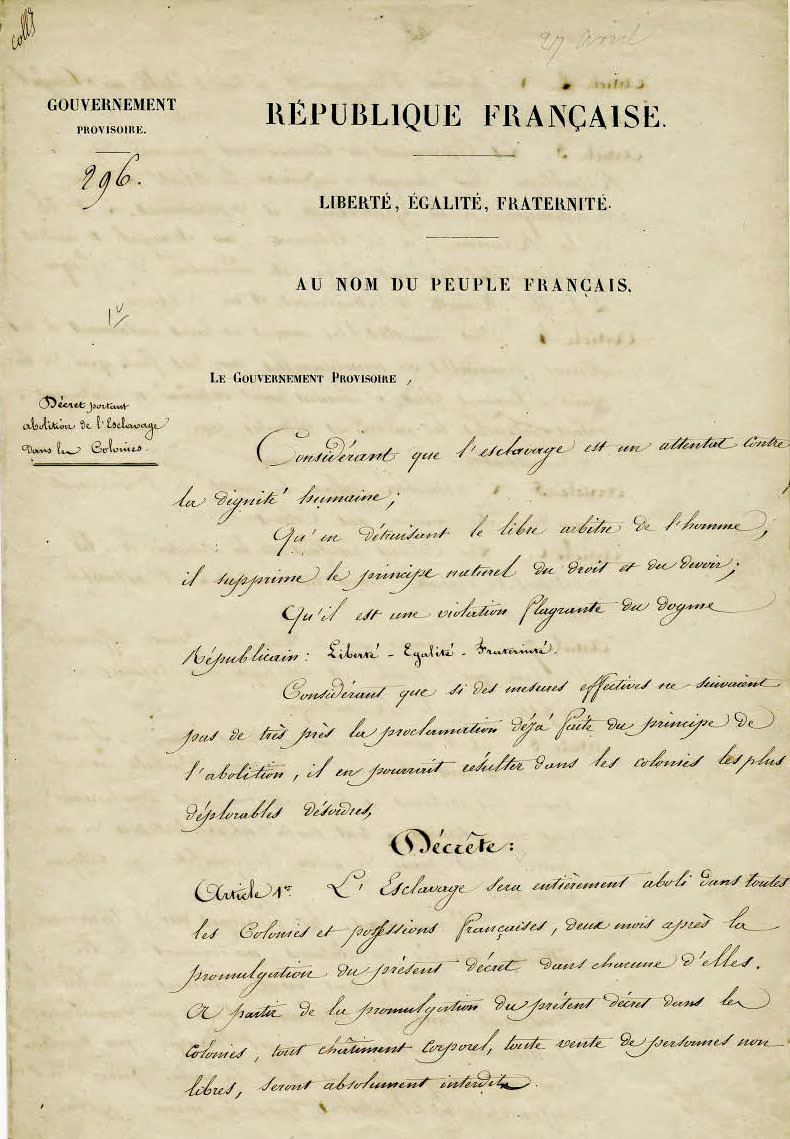 Décret du gouvernement provisoire portant abolition définitive de l'esclavage dans les colonies, première page